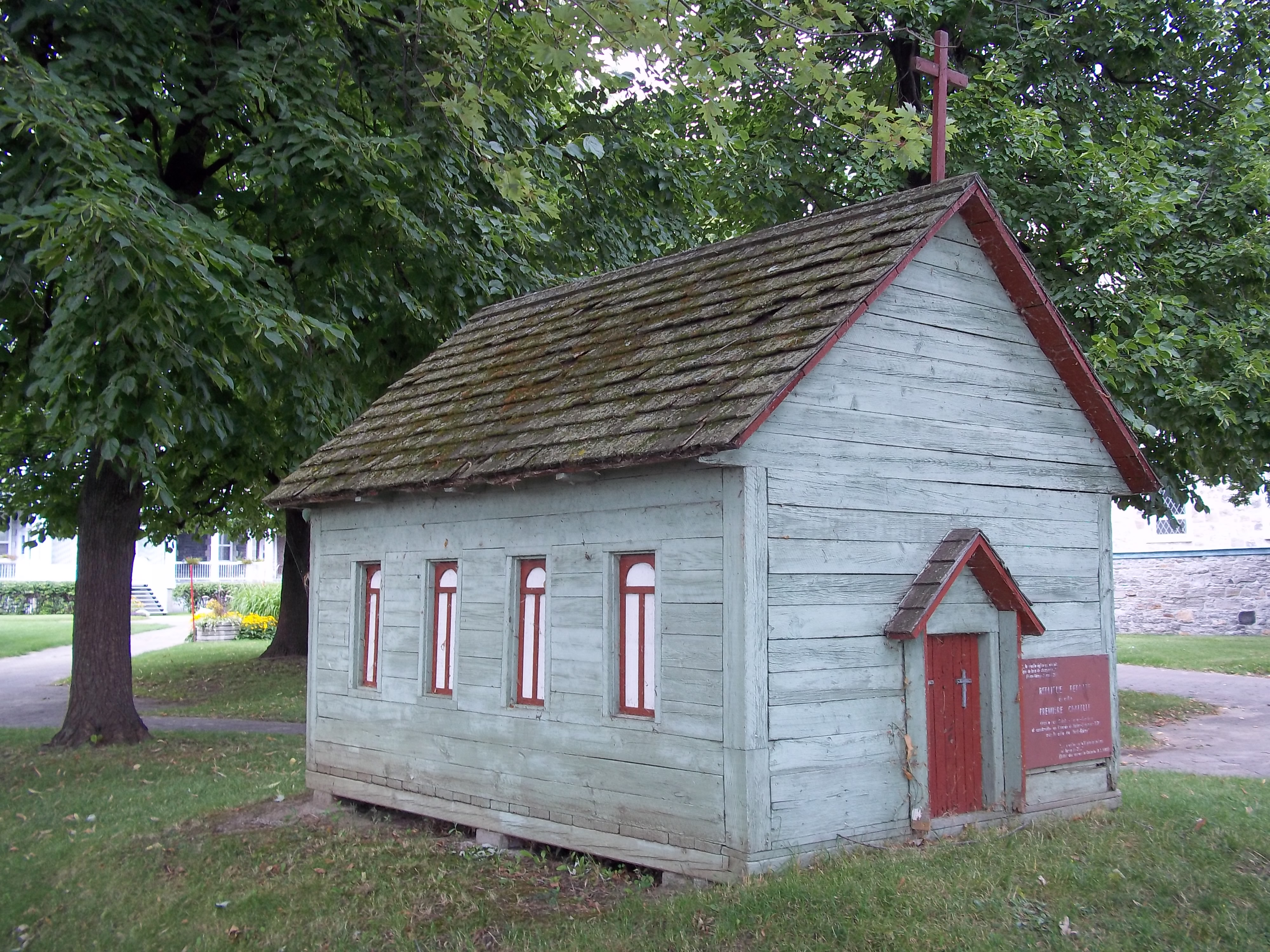 Réplique réduite de la premiere chapelle des Saints-Anges de Lachine